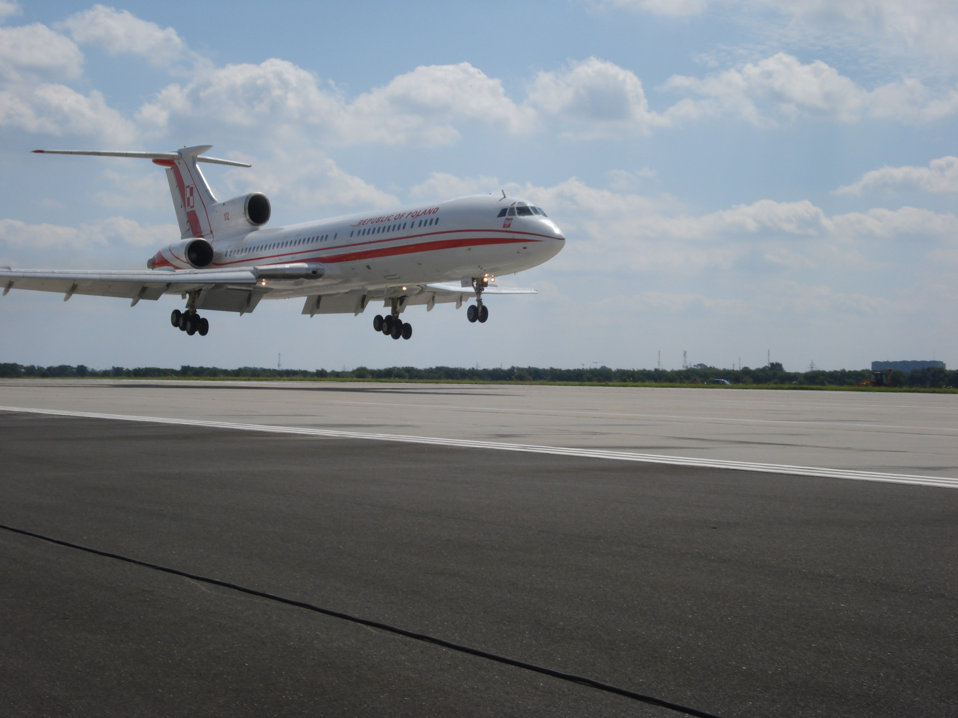 Gdynia-Babie Doły - Tu-154 z 36 Specjalnego Pułku Lotnictwa Transportowego